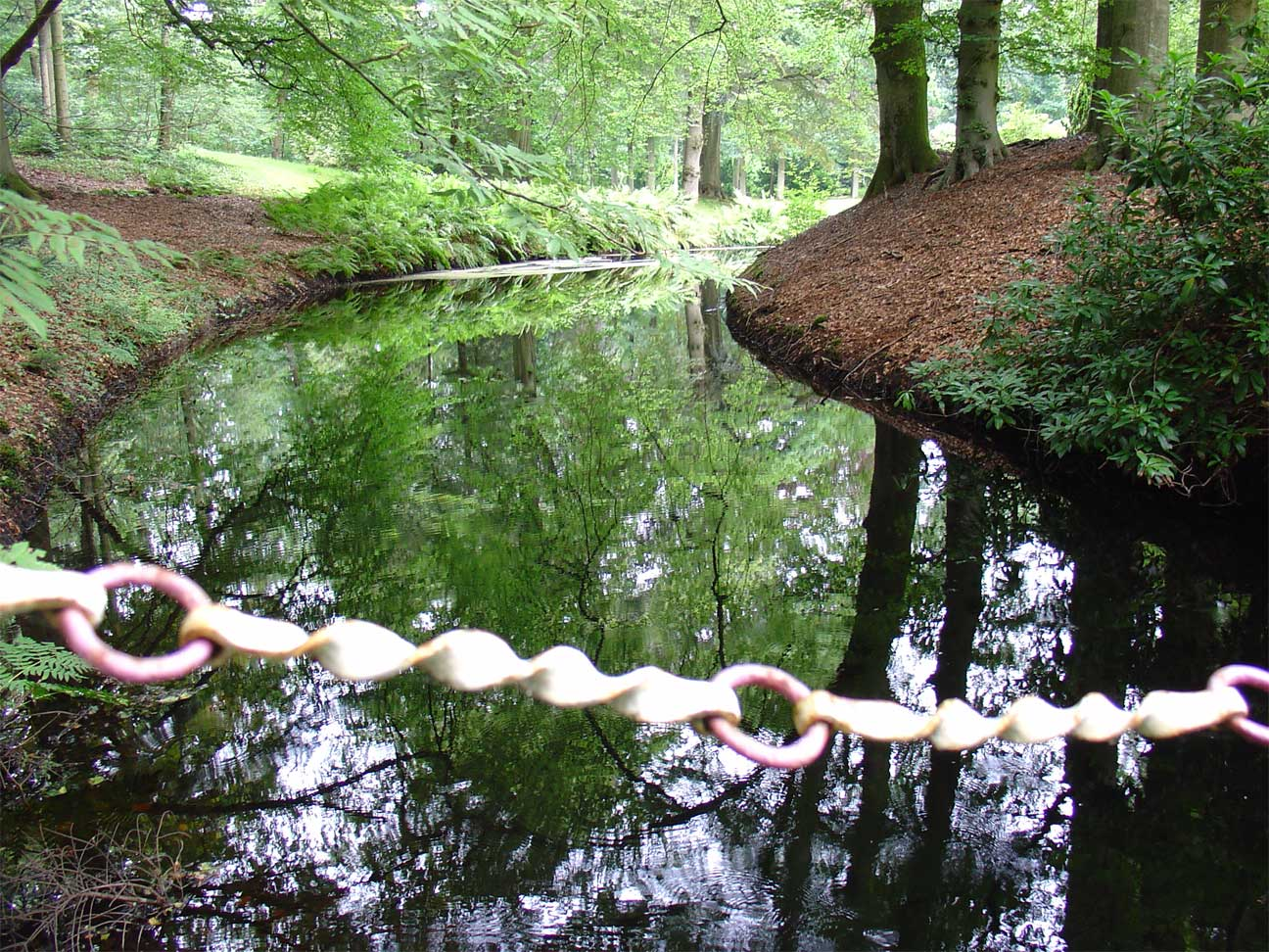 Park bij buitenplaats Oranjestein in Oranjewoud (ontworpen door Lucas Pieters Roodbaard)